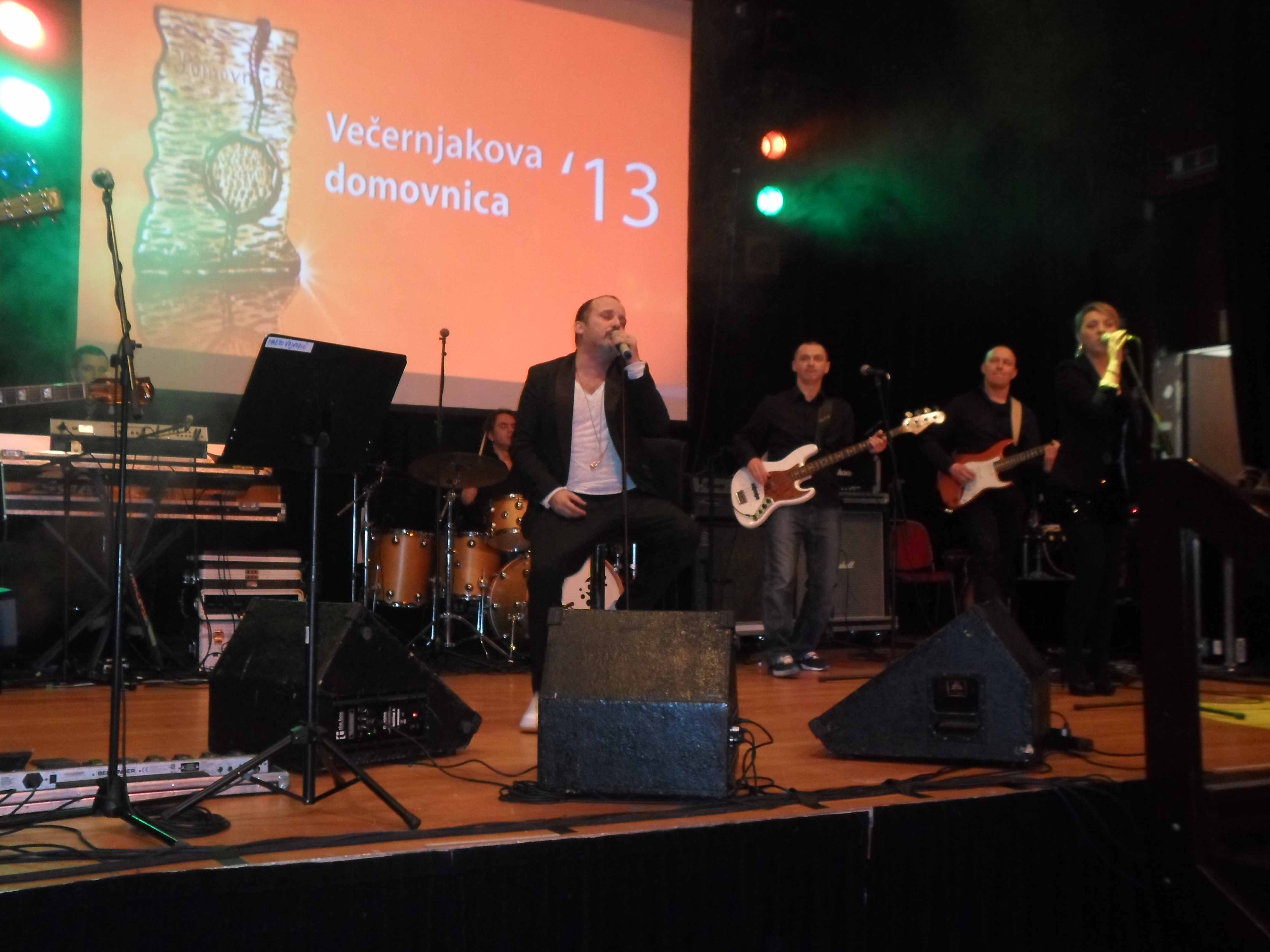 Kurhaus Bad Homburg, Vecernjakova Domovnica/Kroatischer Heimatpreis 2013, Toni Cetinski